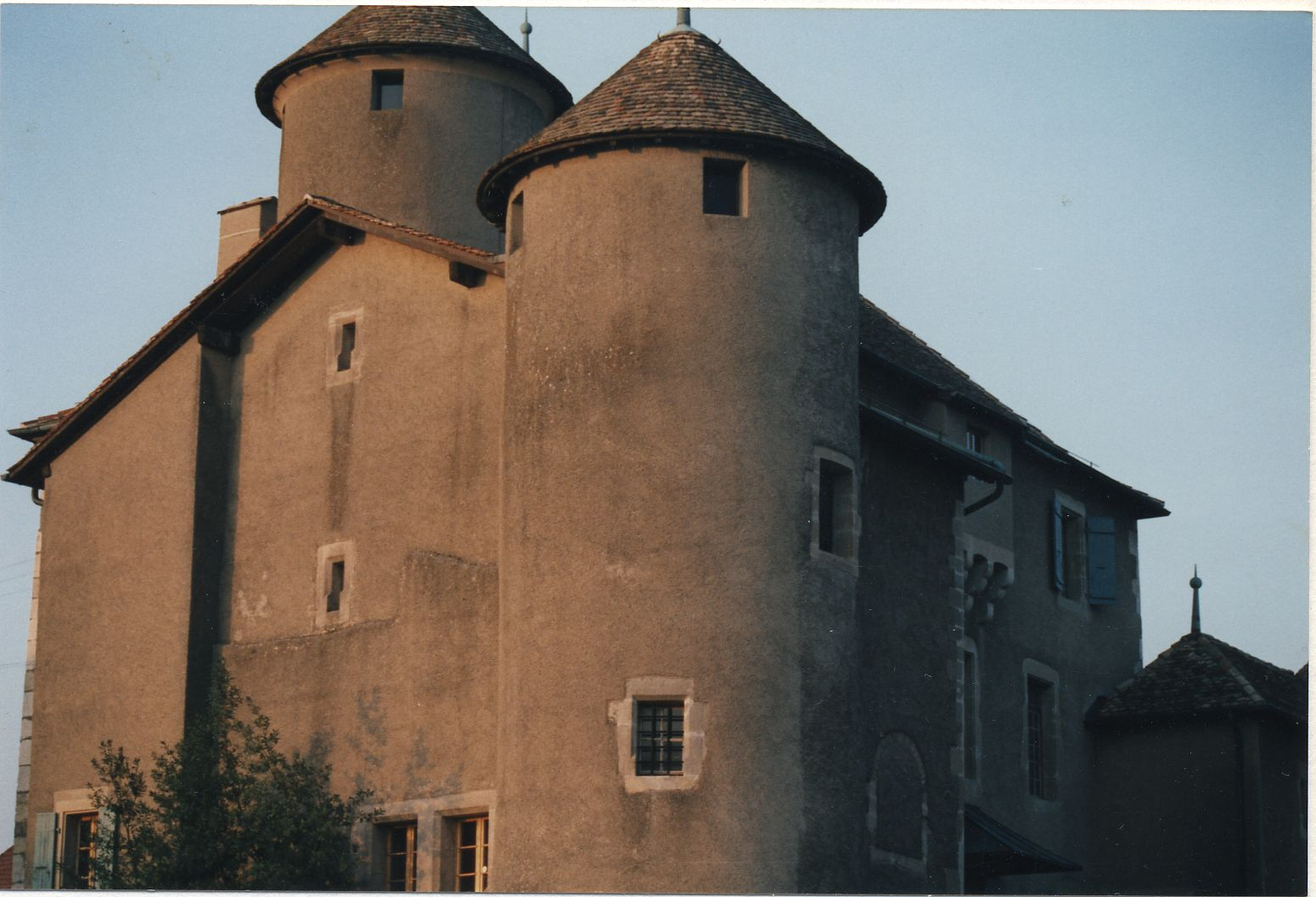 Komturei Compesières, Kanton Genf